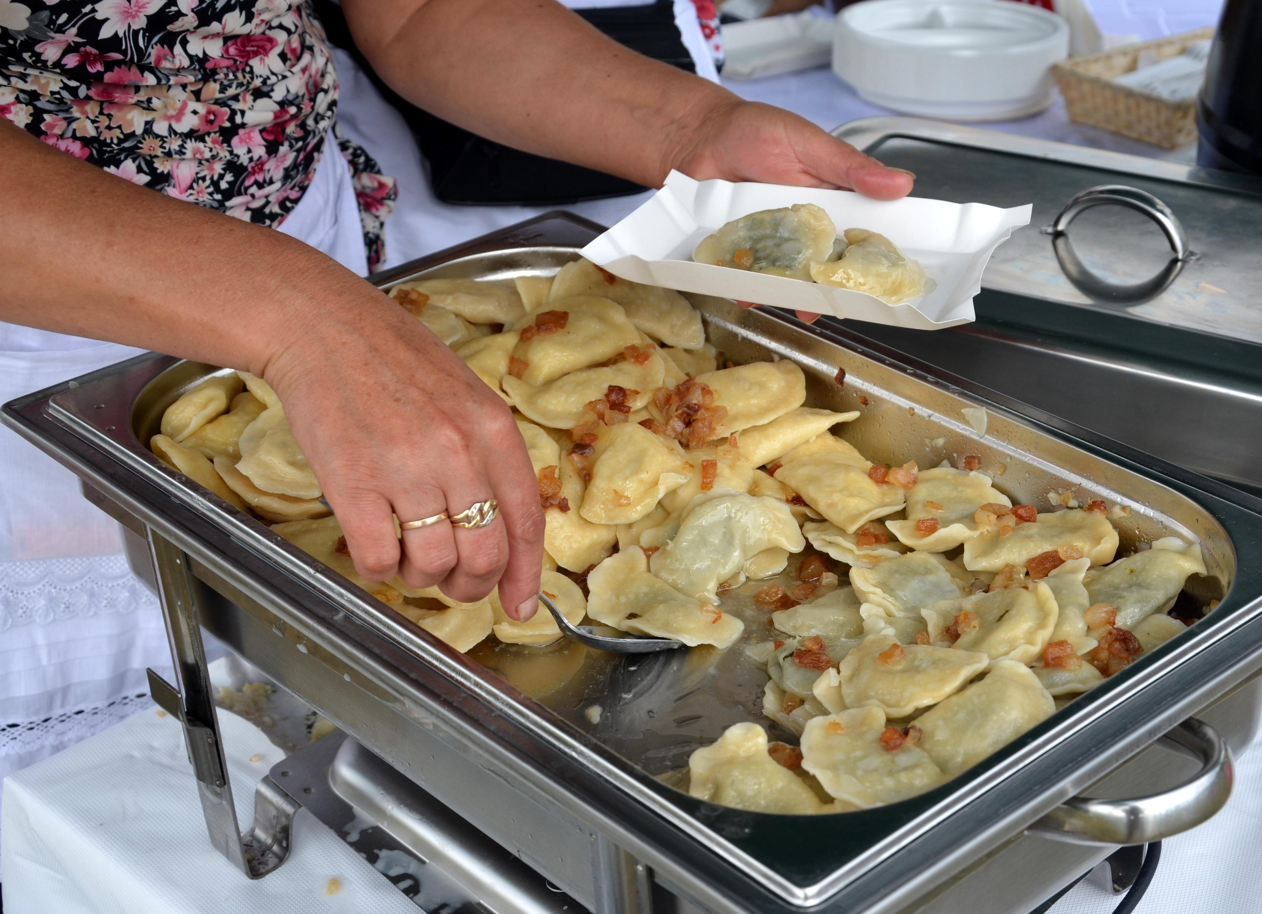 Gefüllte Teigtaschen aus Nordvorkarpaten